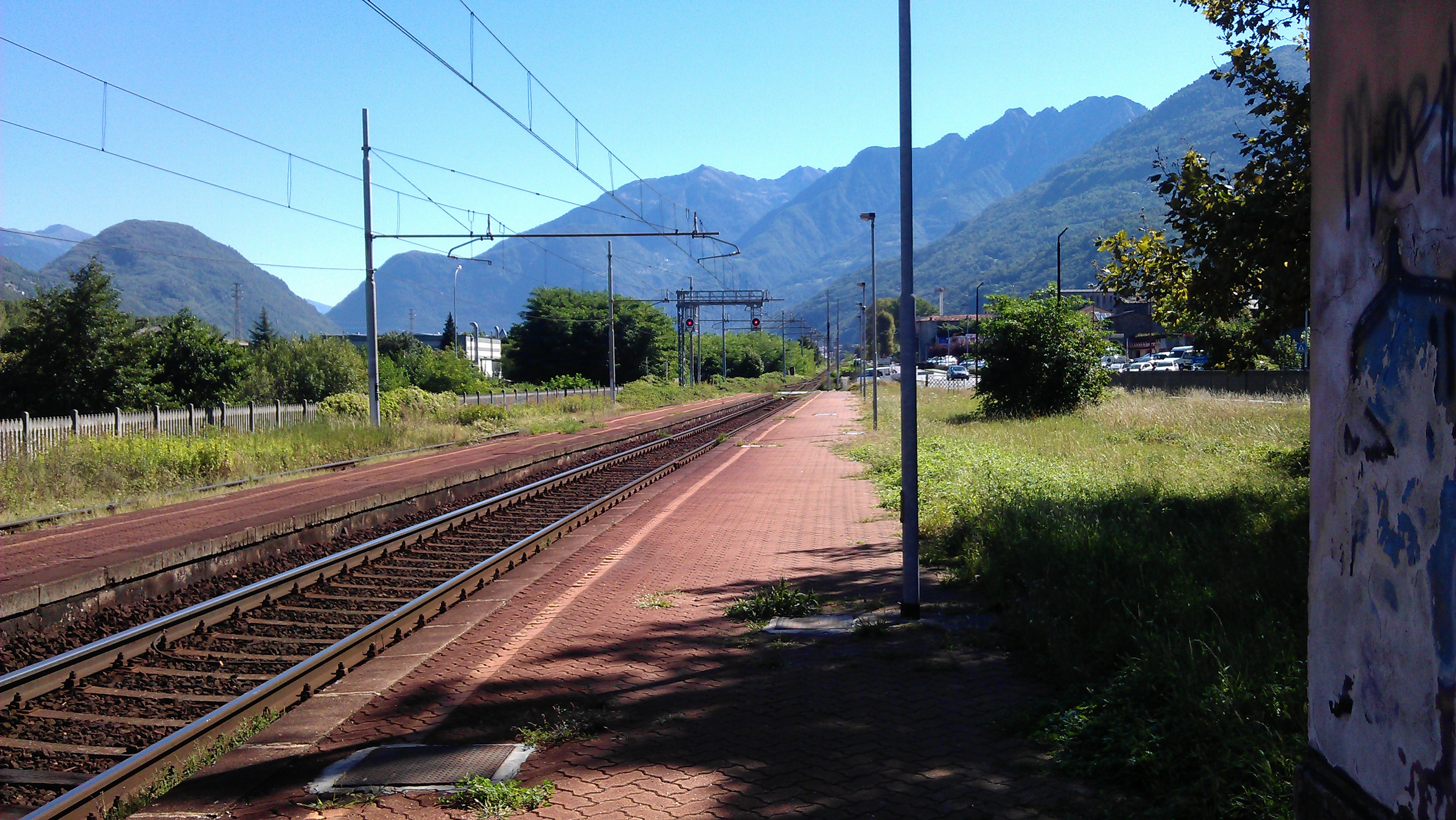 I binari lato Sondrio